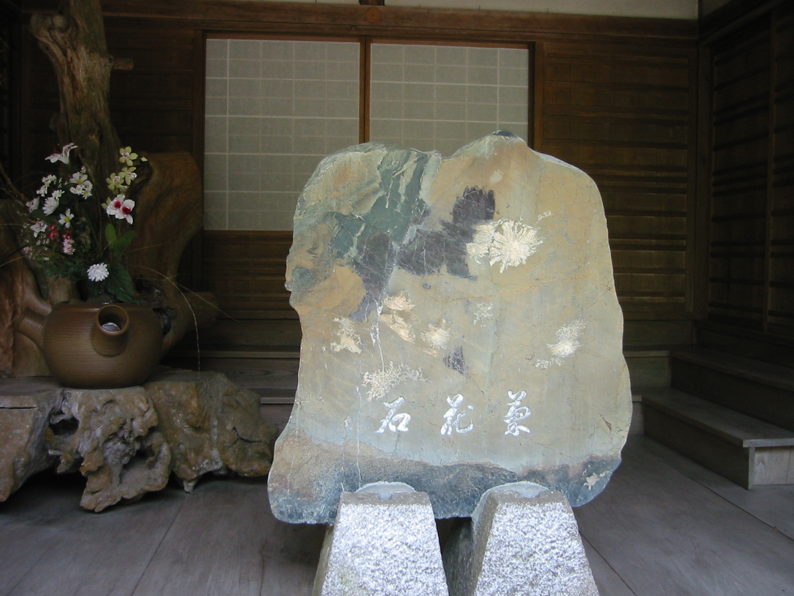 谷汲山華厳寺